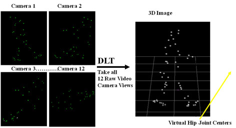 adquisicion de informacion